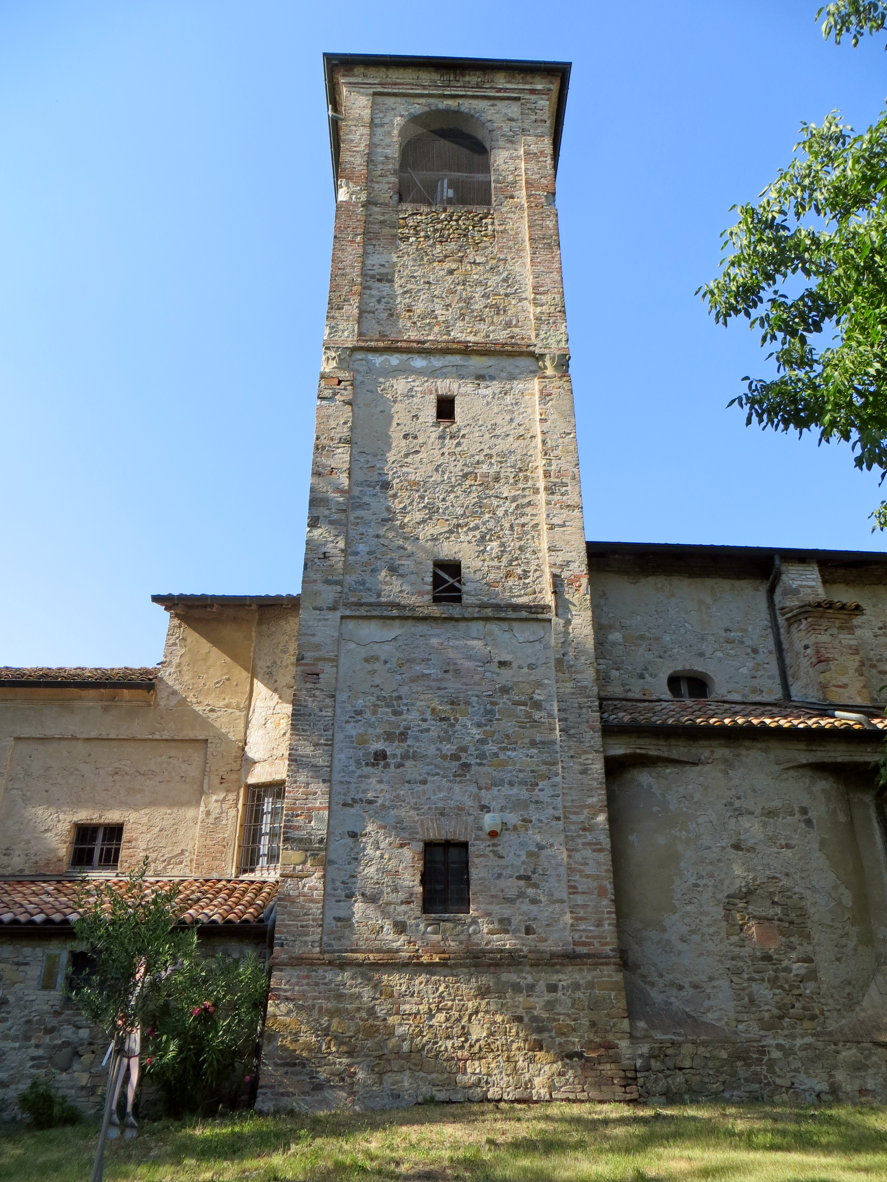 Chiesa di San Martino (Madregolo, Collecchio) - campanile